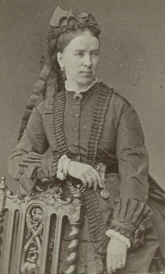 Графиня Екатерина Николаевна Толь, ур. Долгорукова (1825—1892)